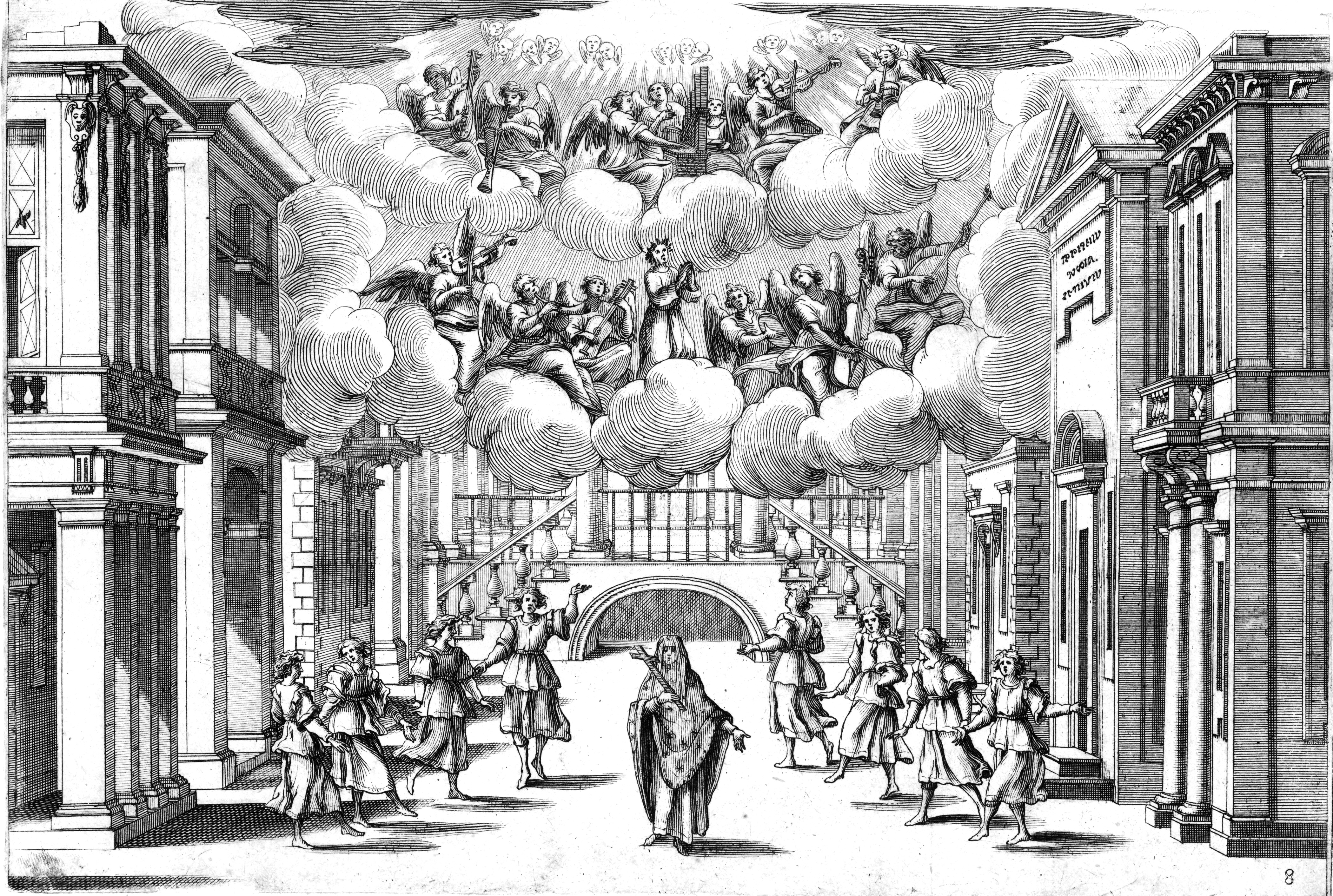 Stefano Landi - Il Sant'Alessio - Rome 1634 - Plate 8 without proscenium